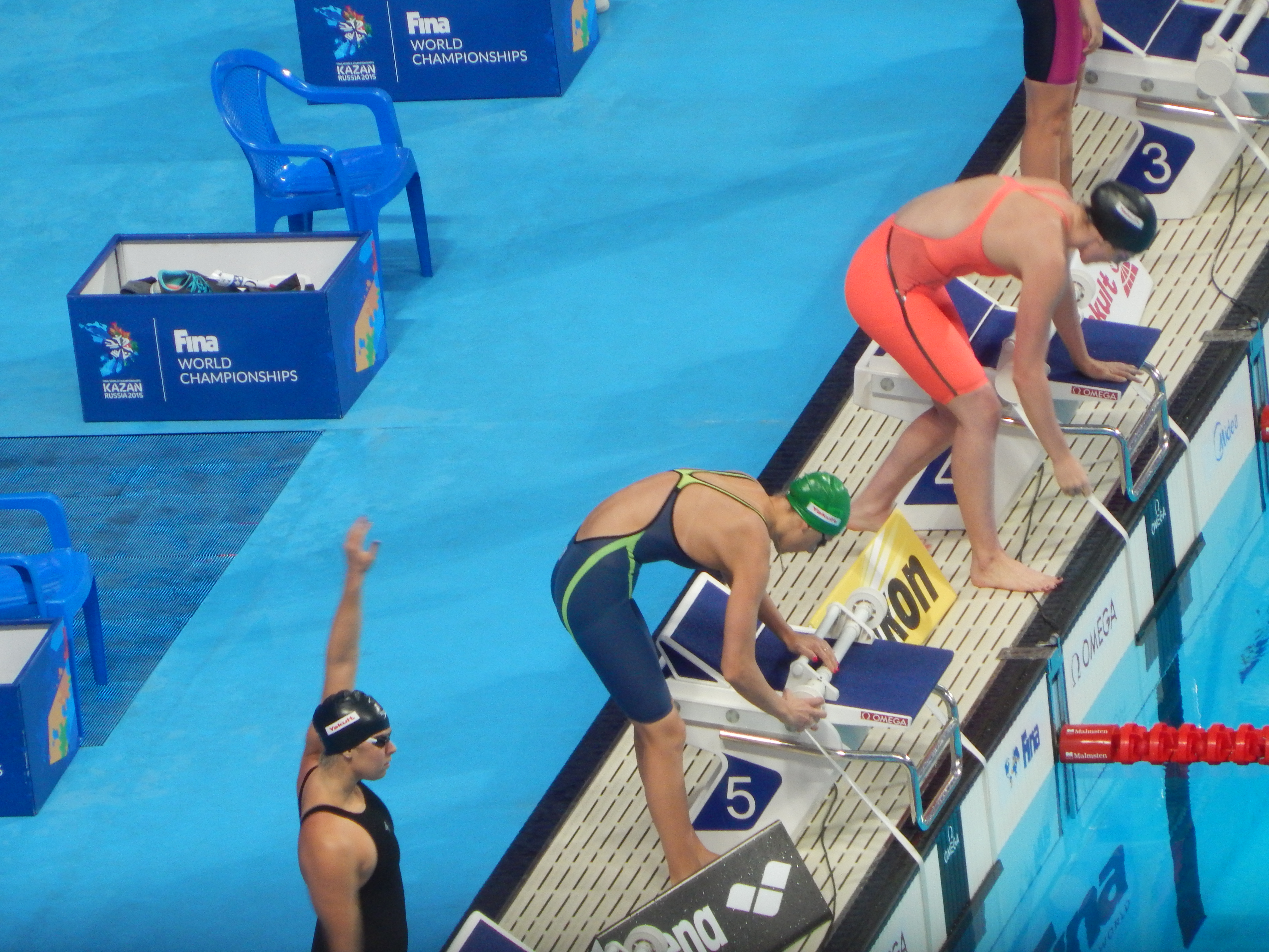 Дарья Устинова и Мисси Франклин перед полуфиналом на 200 метров на спине на ЧМ в Казани